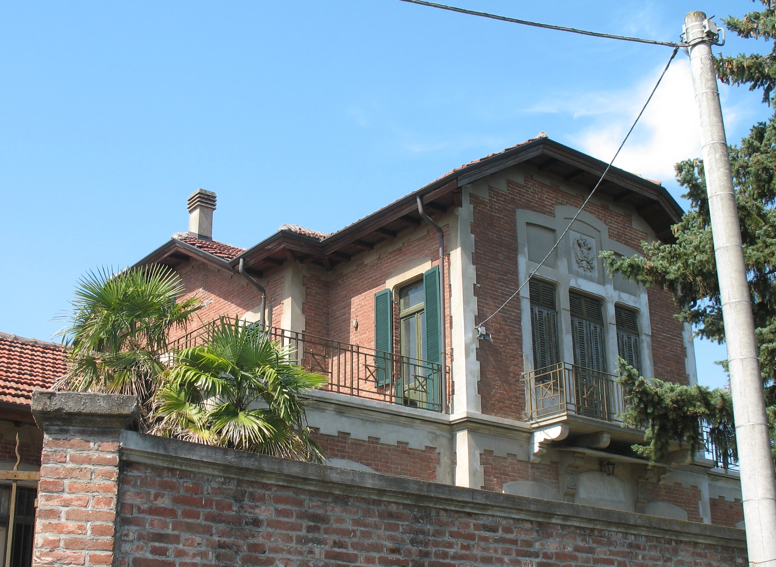 L'ex-asilo infantile (poi casa di riposo Cappuccini "Don Orione", oggi proprietà del Comune) Cacherano di Bricherasio, a Fubine, Alessandria, Piemonte, Italia.